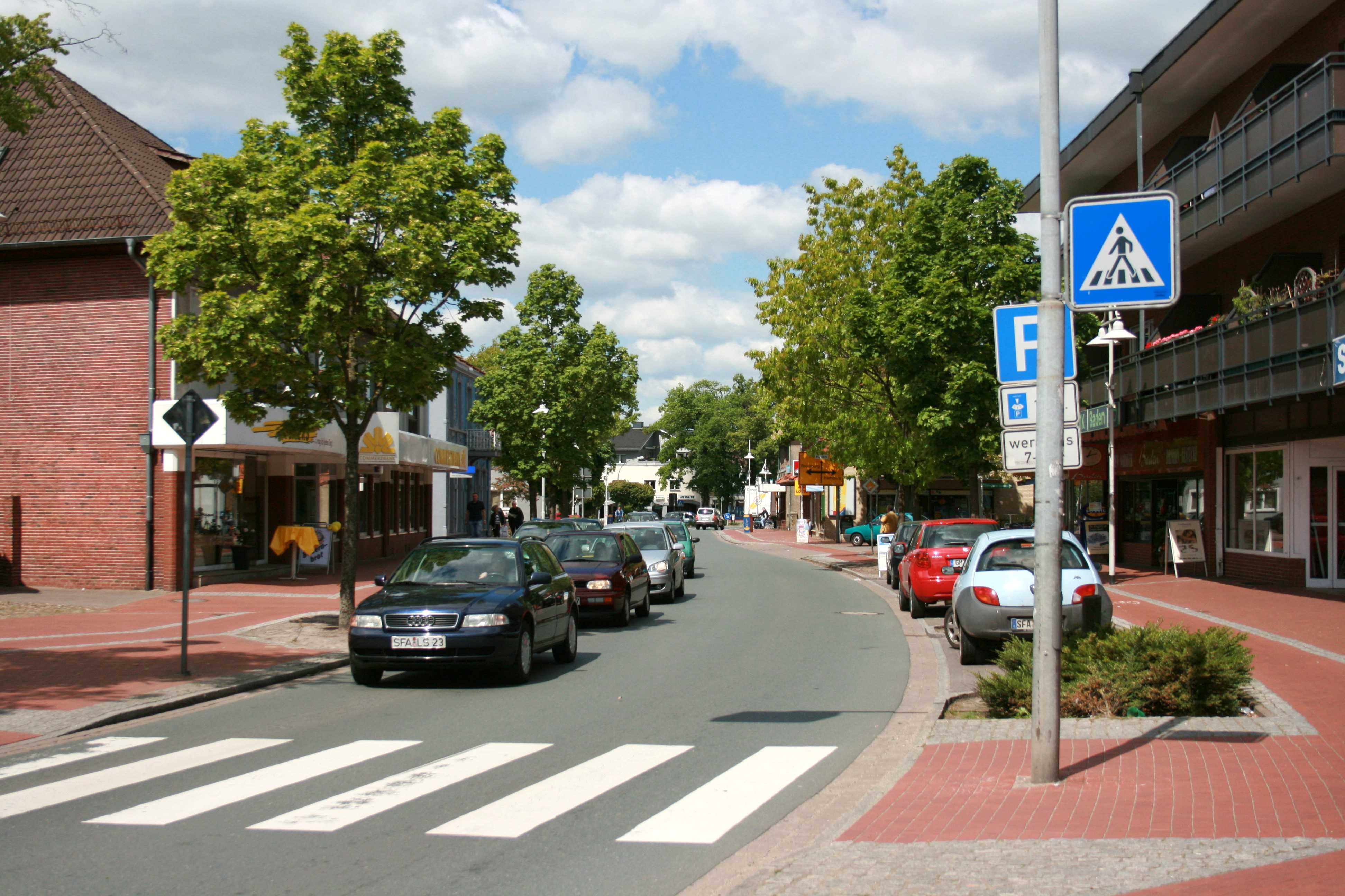 Verdener Straße in Schneverdingen